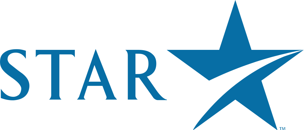 दूरचित्रवाणी